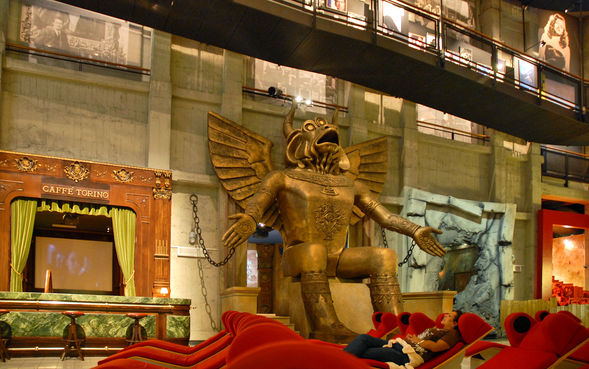 Au centre, la statue du Dieu Moloch du film "Cabiria" de Giovanni Pastrone. Museo nazionale del Cinema (Turin)